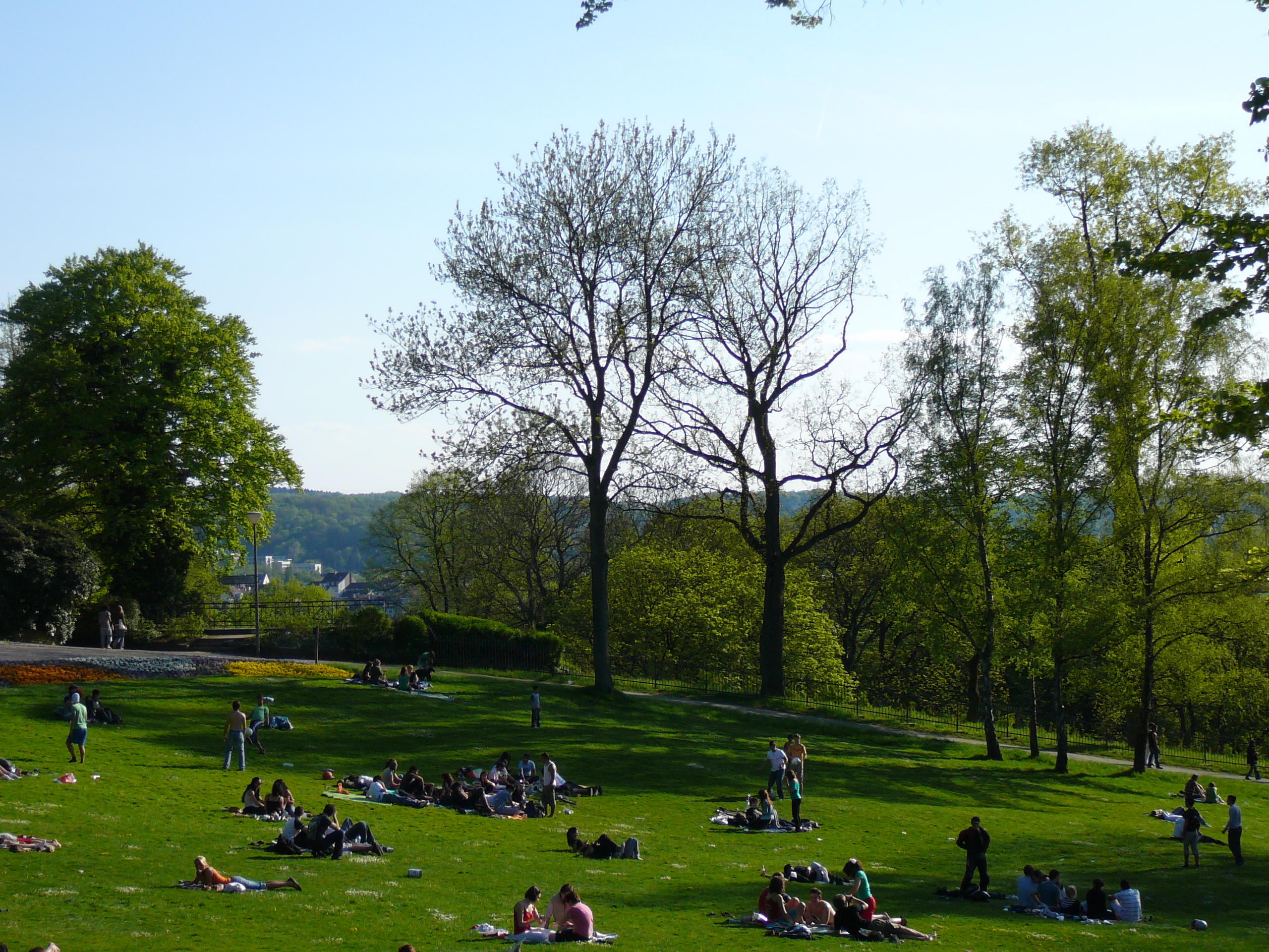 Hardt-Anlagen, Wuppertal